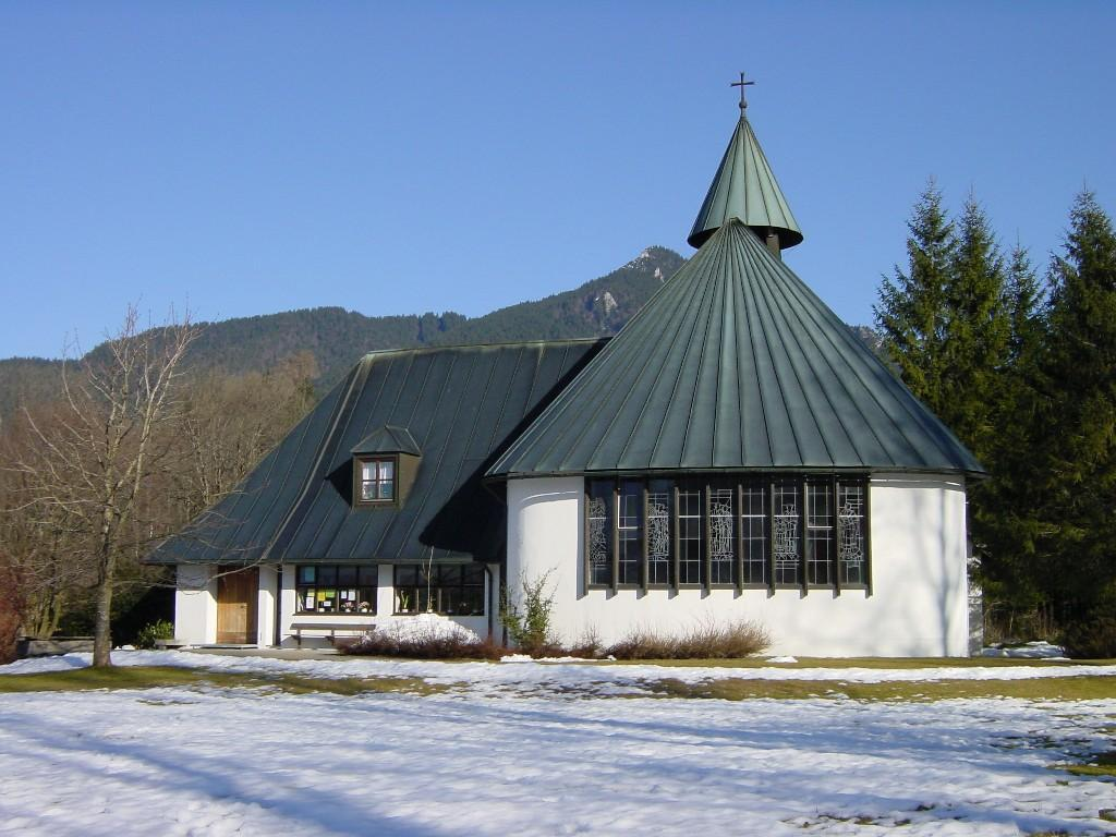 Evang.-Luth. Waldkirche in Lenggries von Westen